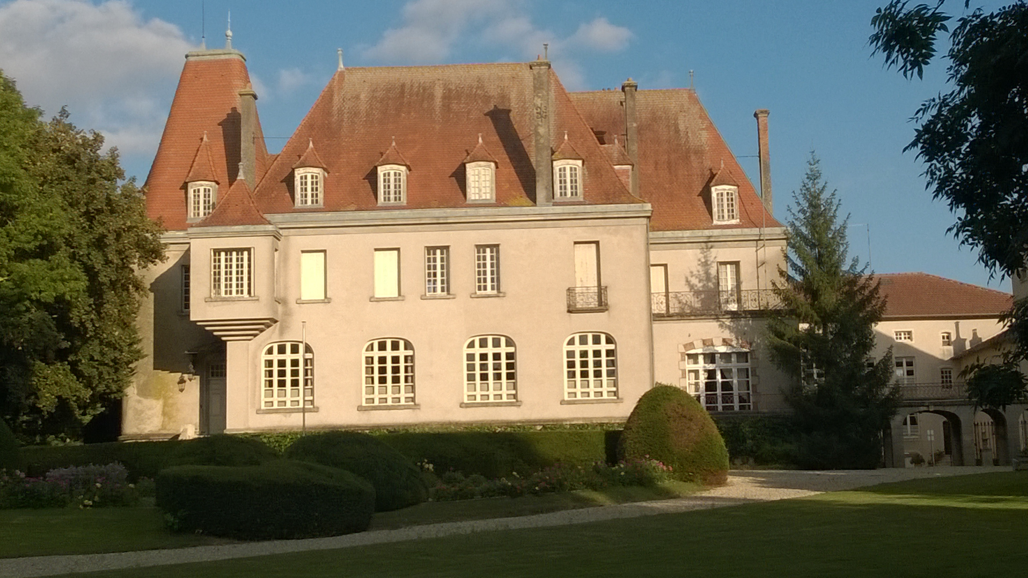 Château de Thorey-Lyautey et son parc, inscrit aux Monuments historiques en 1980. It is indexed in the Base Mérimée, a database of architectural heritage maintained by the French Ministry of Culture, under the references PA00106370 and IA54001211 .